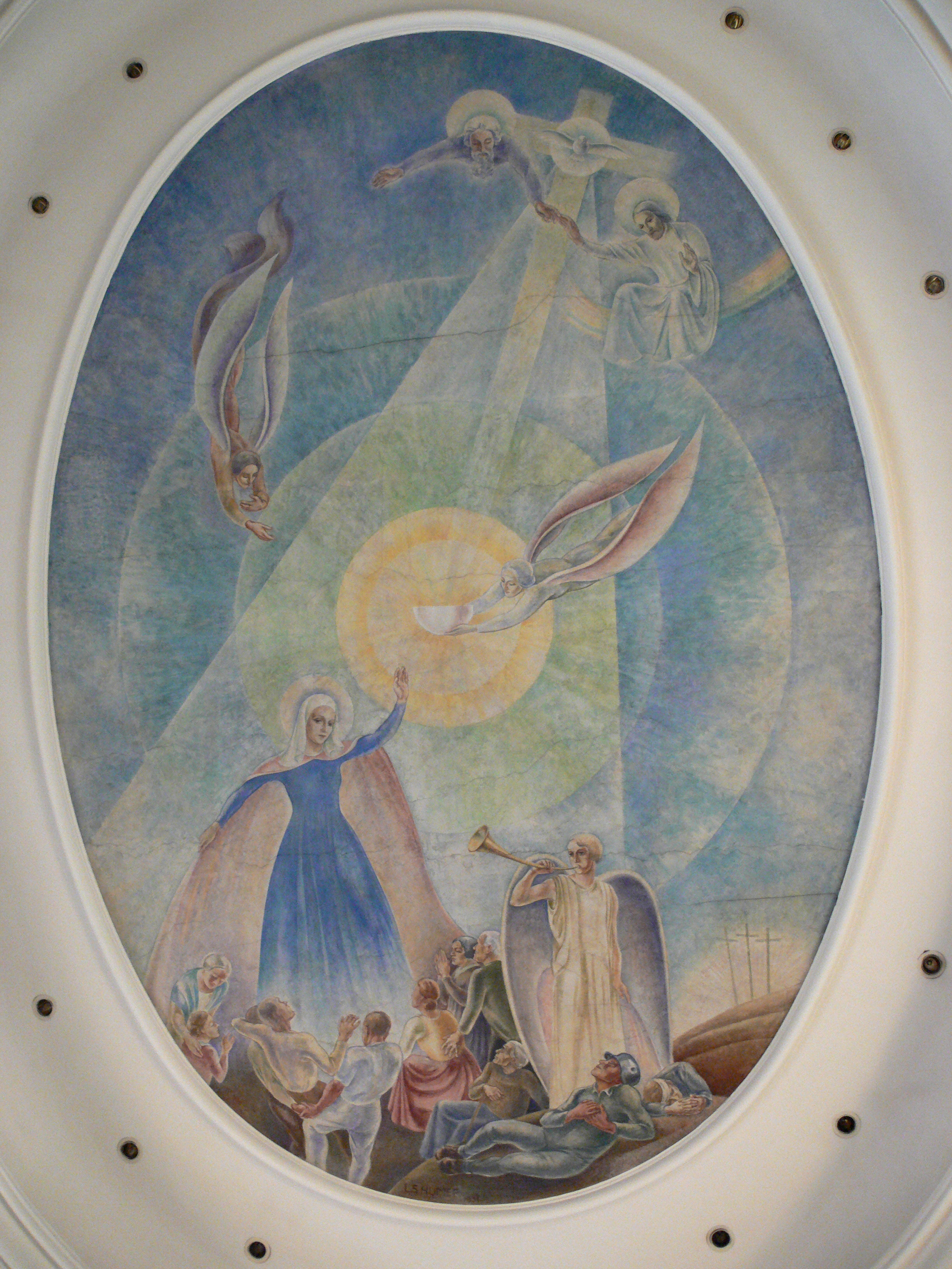 Deckengemälde